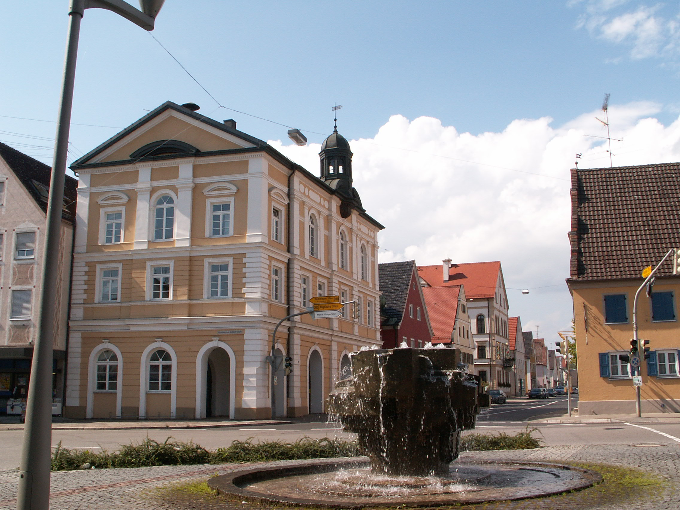 Altes Rathaus in Thannhausen. Im Vordergrund: Felsenbrunnen von Georg Brenninger